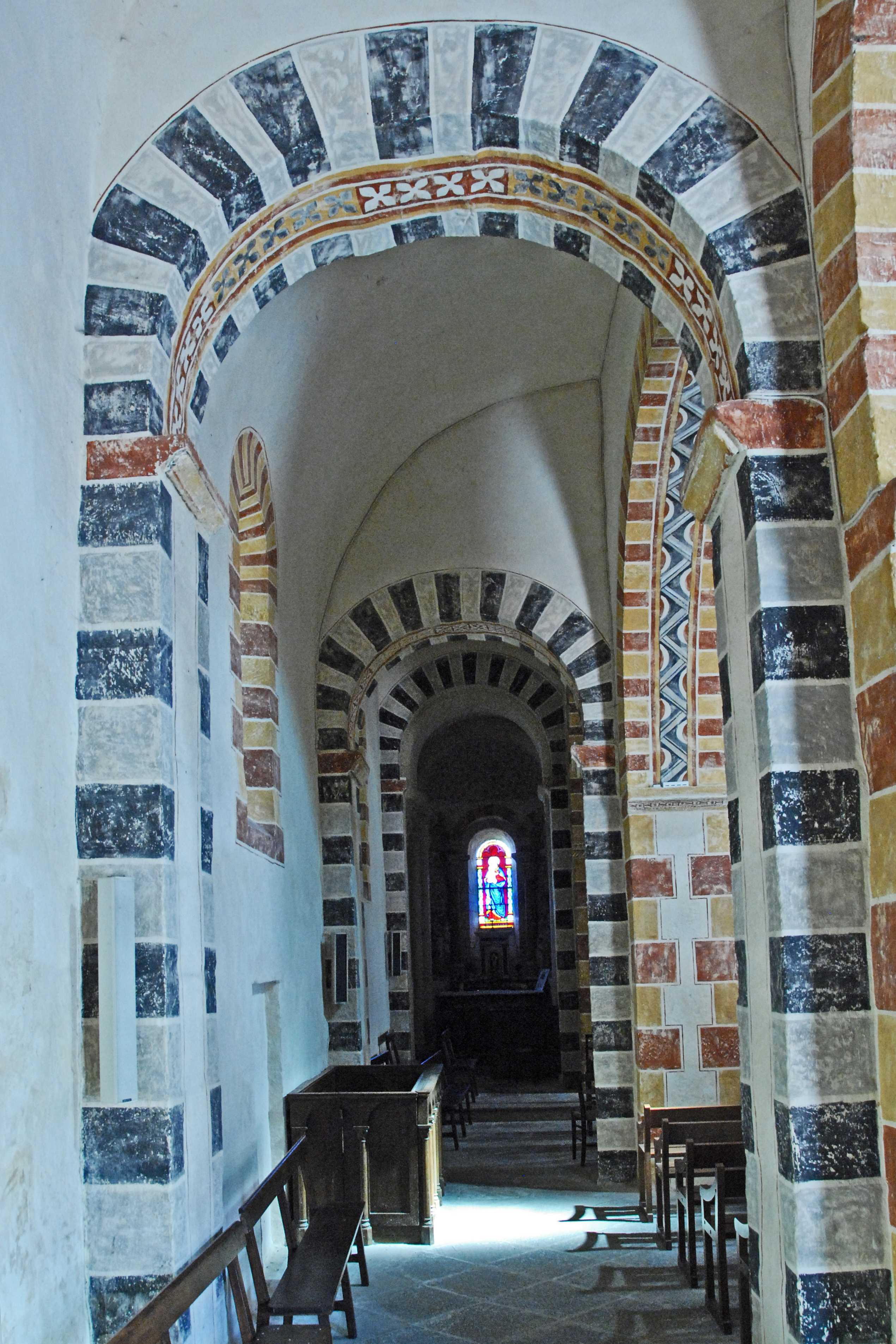 St.-Jean Glaine-Montaigut, nördl. Seitenschiff aus Joch 1